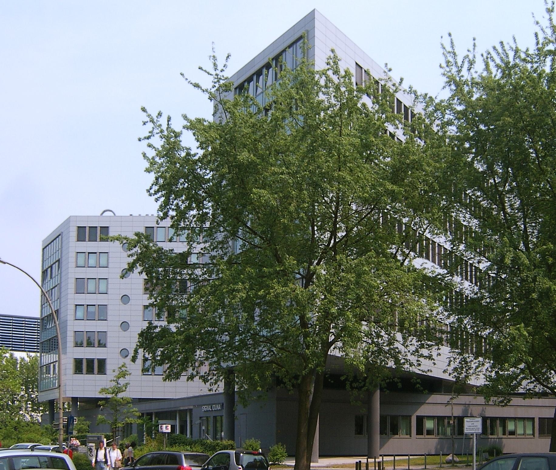 Verwaltungsgebäude des Signal-Iduna-Konzerns in der City Nord, Hamburg.